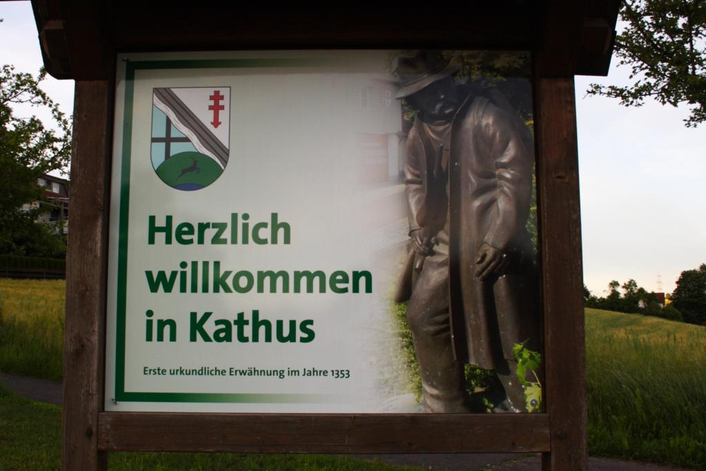 Hinweisschild am Ortseingang